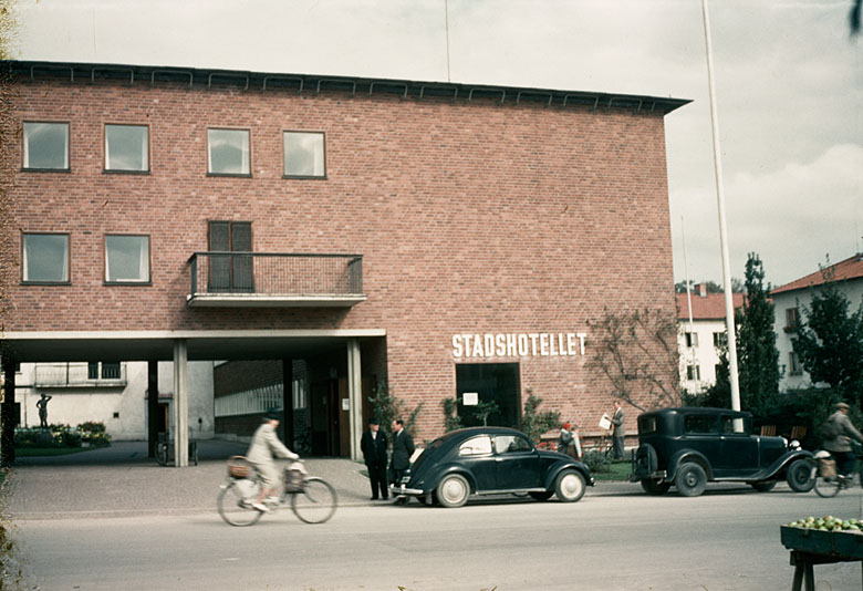 Stadshotellet vid Alfred Nobels torg i Karlskoga. Motiv: Karlskoga Nyckelord: Riksintressen Kategori: Stadsmiljö, Hotell Stadshotellet vid Alfred Nobels torg i Karlskoga.